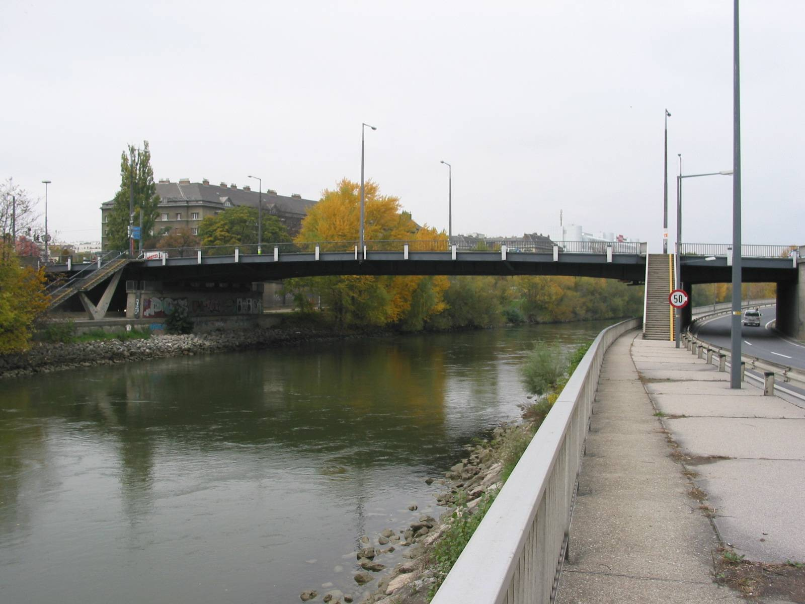 Stadionbrücke über den Donaukanal Wien en: Stadionbrücke, Vienna